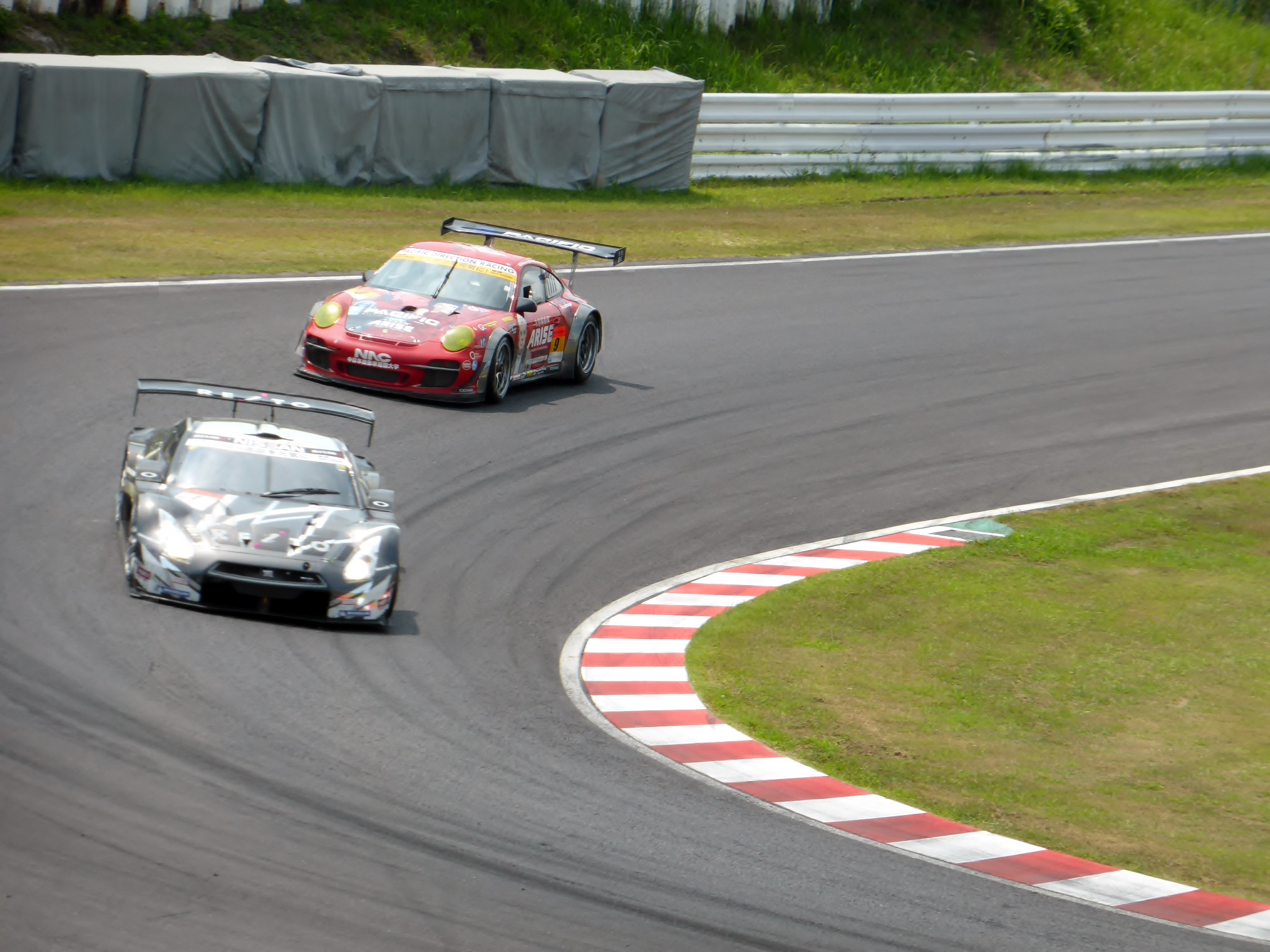 2013年度ポッカサッポロ1000kmに於けるワンシーンを撮影。後日みんカラにもアップロード予定。